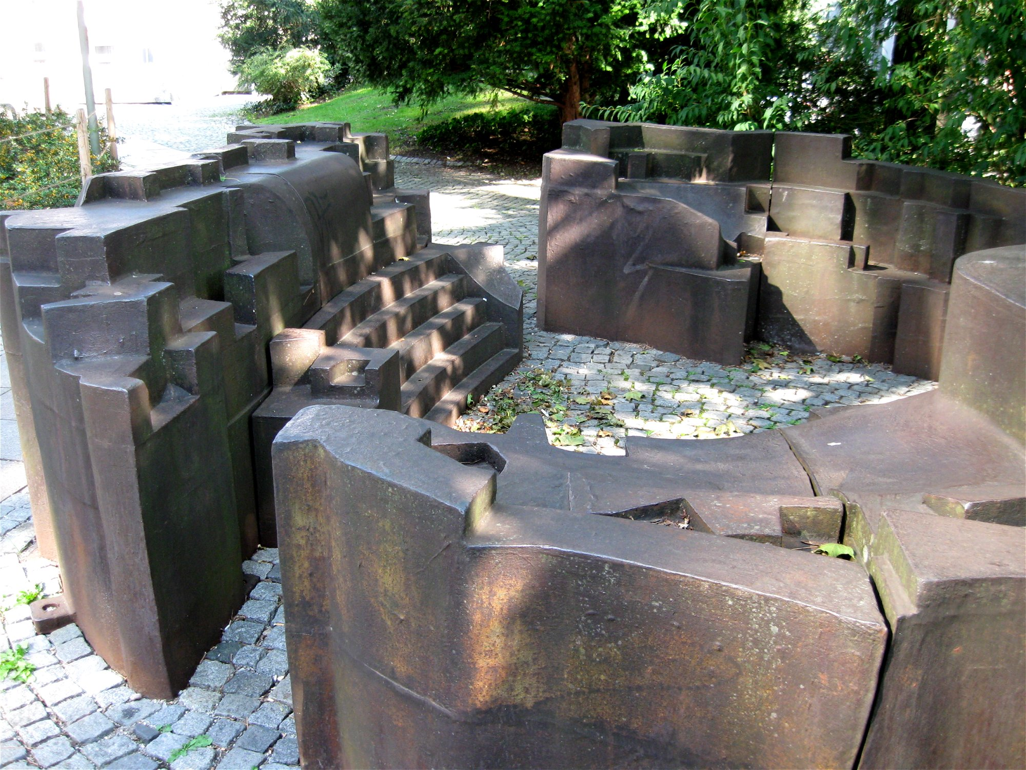 Eduardo Paolozzi: Camera, Gusseisen, Europäisches Patentamt, München